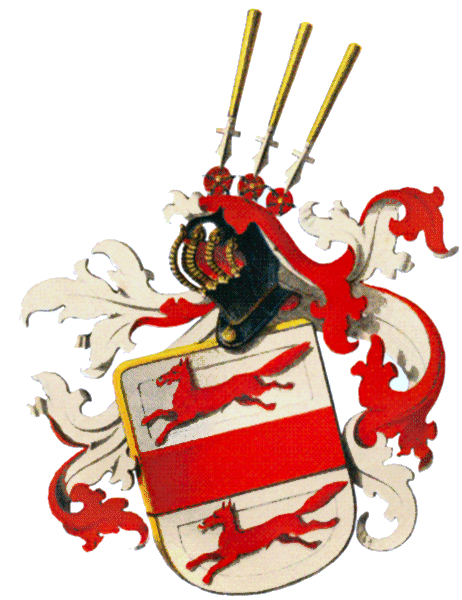 Wappen der von Kleist